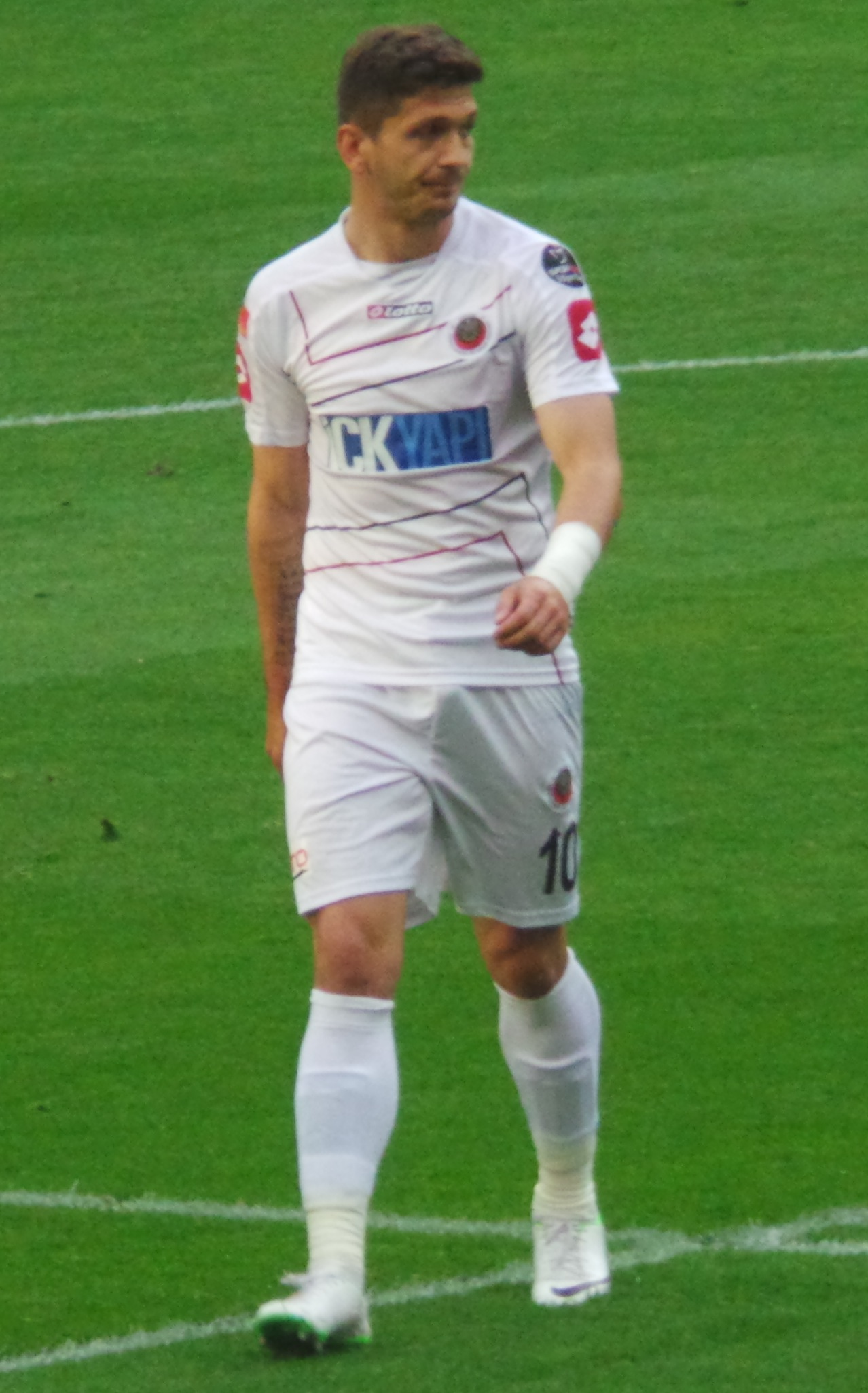 Ermin zec'14